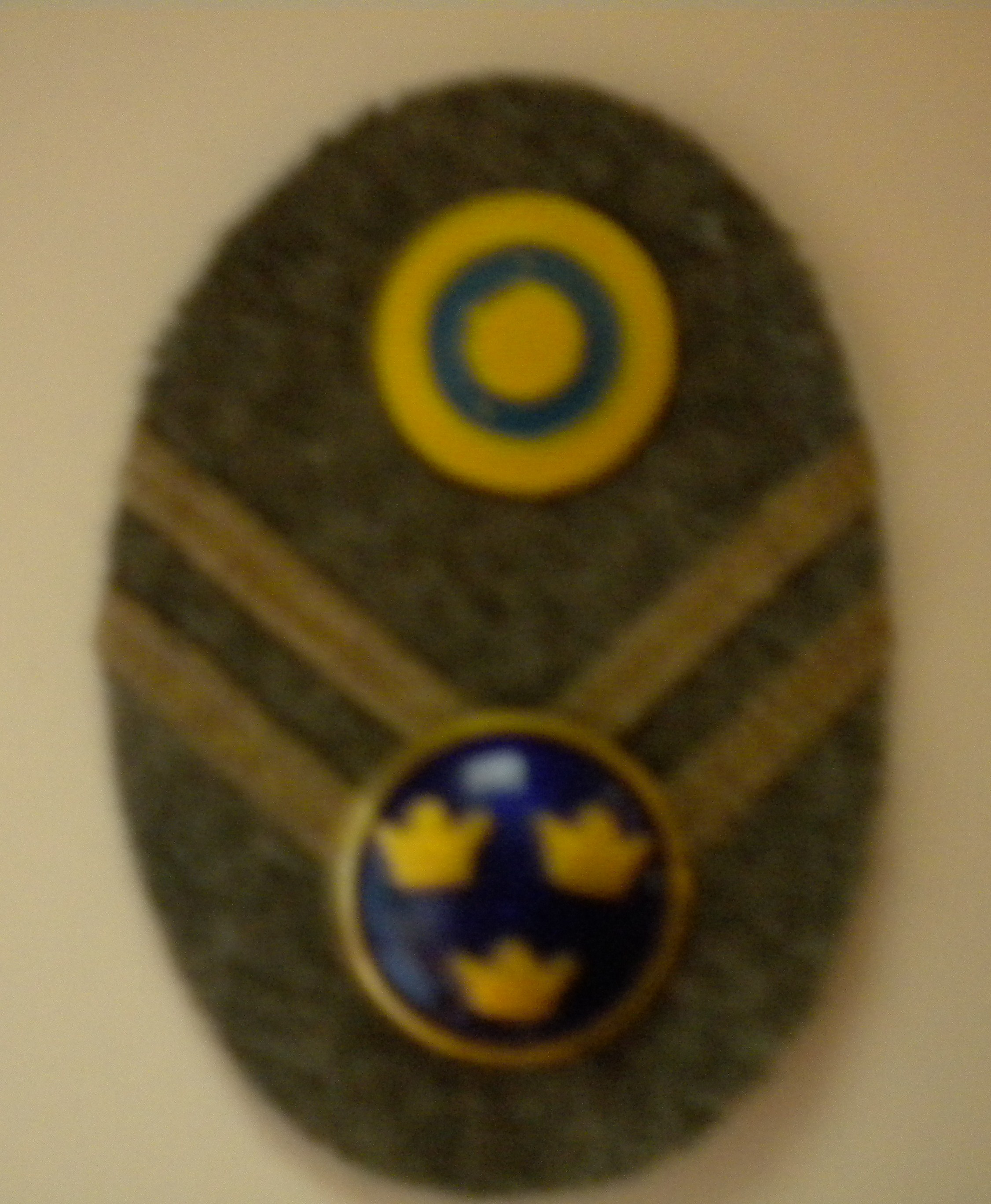 Arméns mössmärke m/1946 till båtmössa, löjtnants grad.